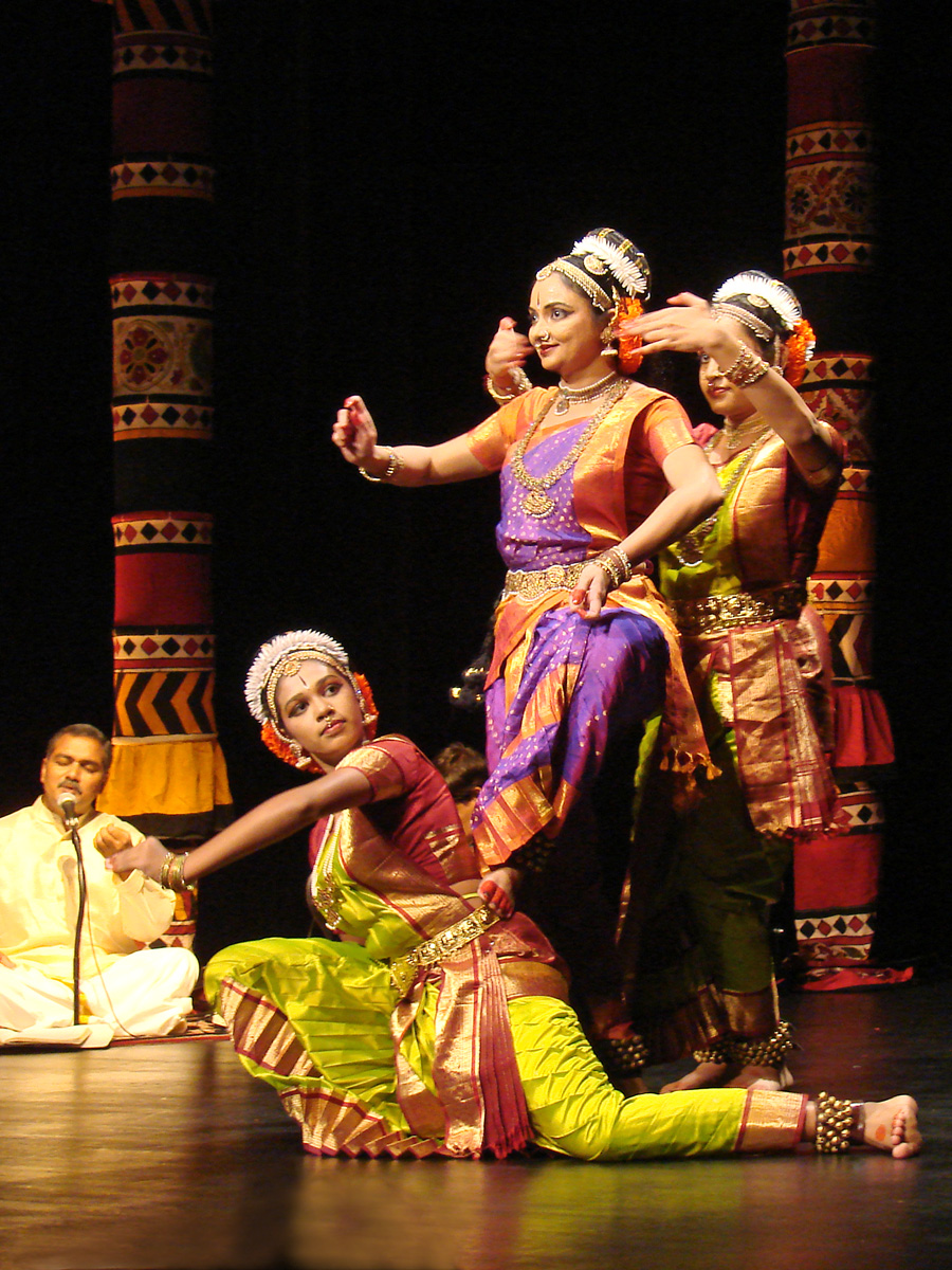 Spectacle de danse Kuchipudi, organisé par le service de l'auditorium du musée Guimet en coproduction avec Triveni, présenté le samedi 19 avril 2008, dans l'auditorium du musée Guimet à Paris par : "Deepika Reddy et ses musiciens" Sur la photo, Deepika Reddy et ses danseuses : Mihira Pathuri et Pooja Reddy (devant le groupe) appartenant à Deepanjali, l'institution qu'elle a fondée en Inde et qui est dédiée à l’excellence de la pratique du Kuchipudi.